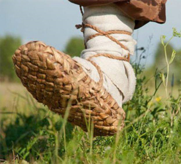 Łapeć założony na lnianą onucę.